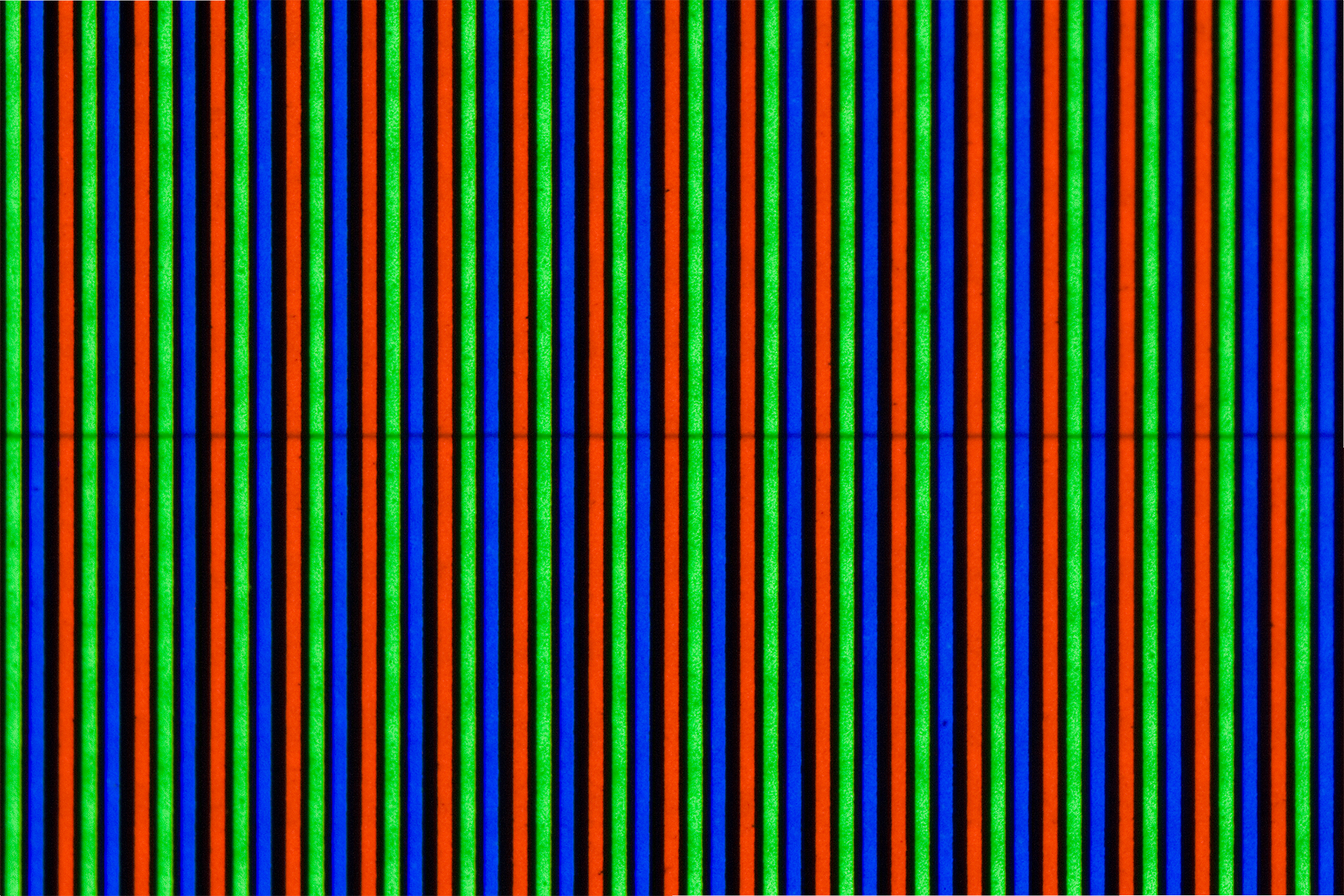 1.2 only